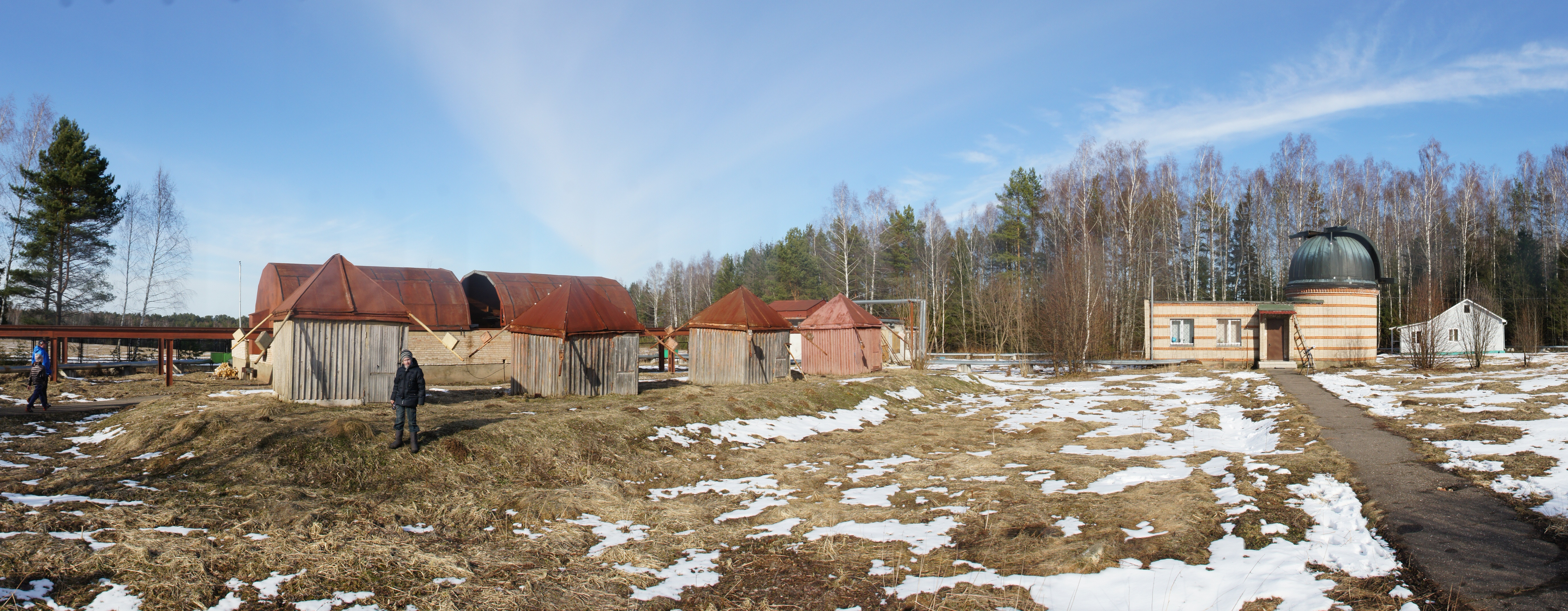 Звенигородская обсерватория